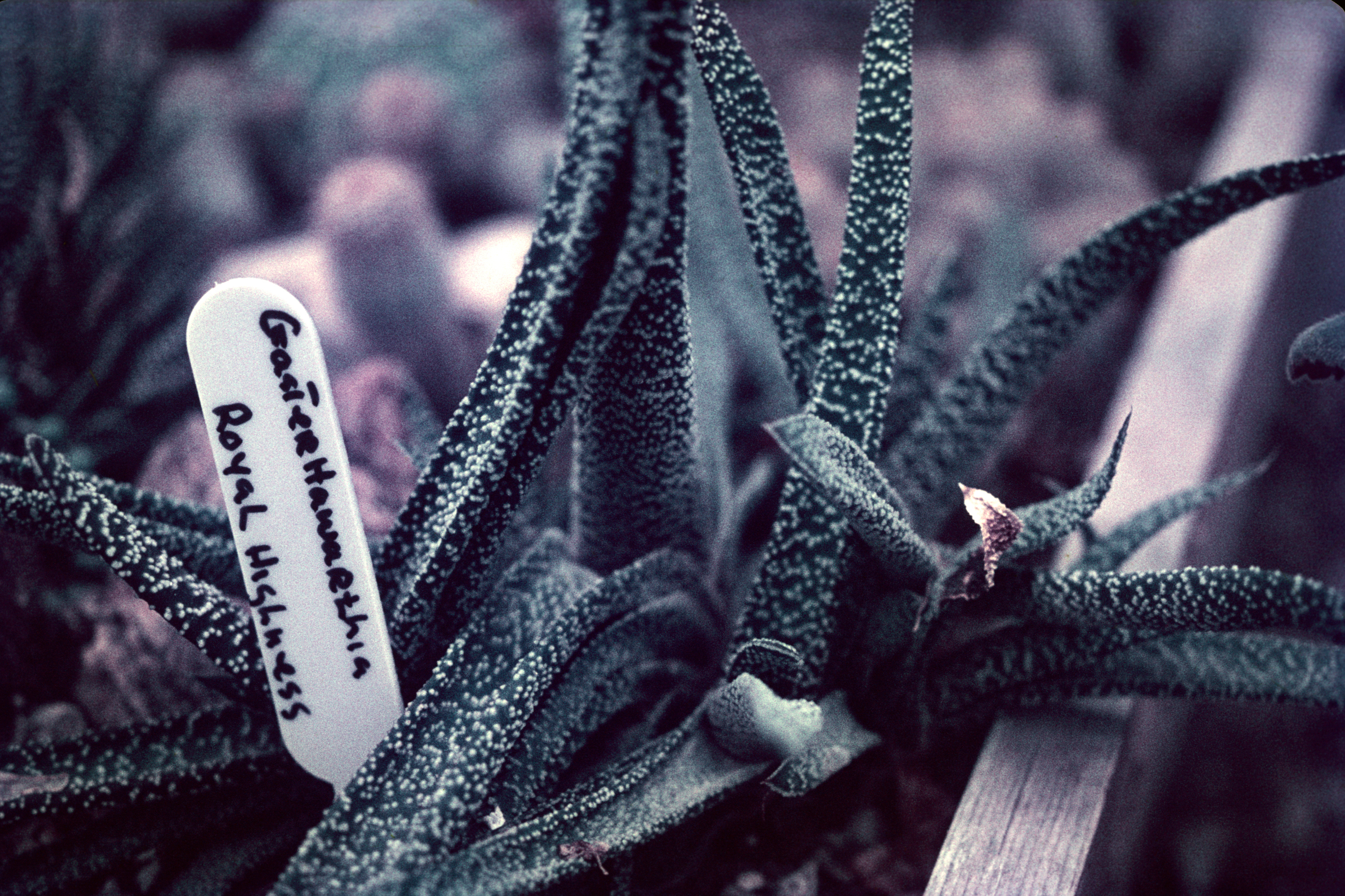 Gasterhaworthia